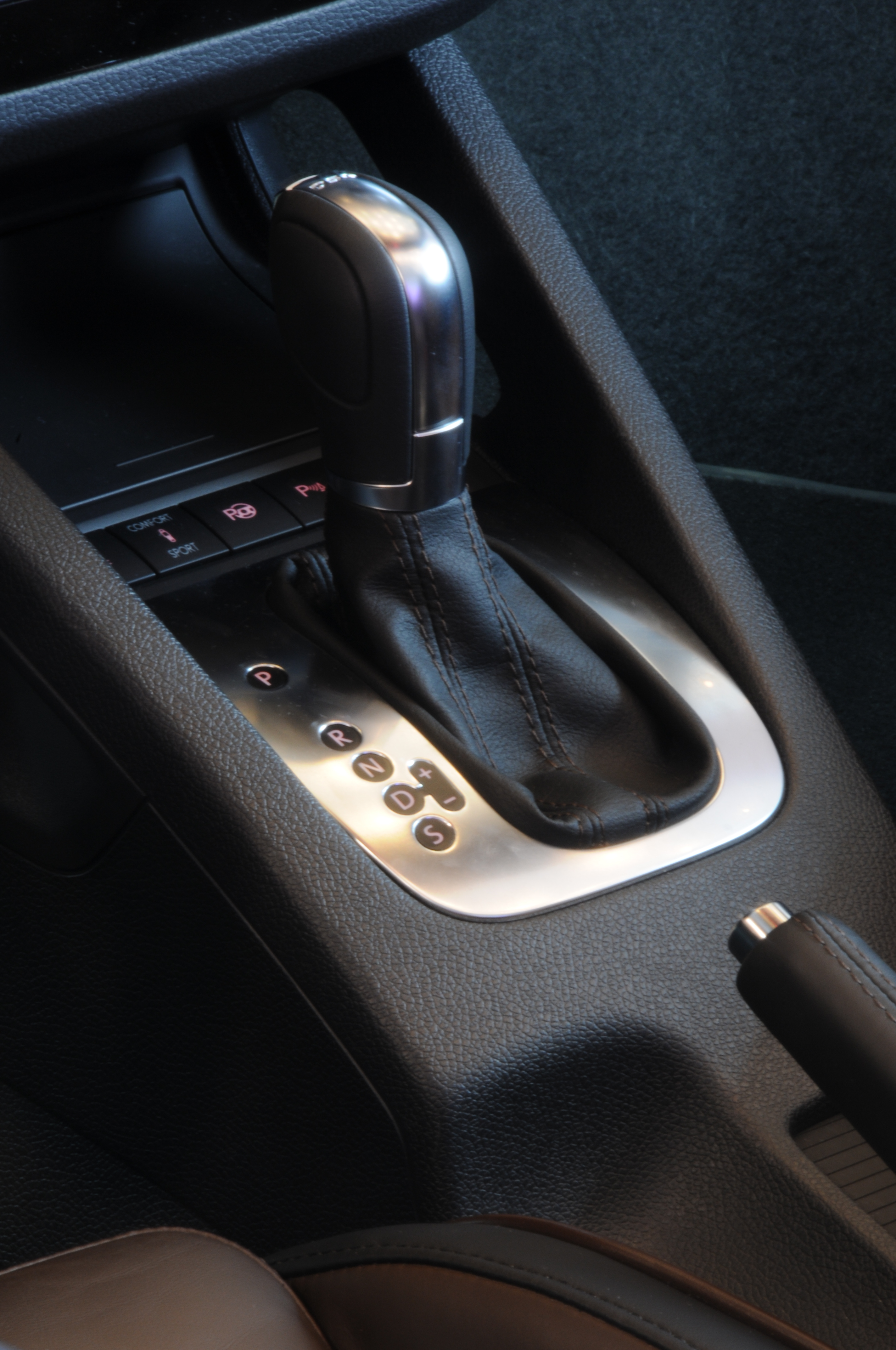 Detail Volkswagen